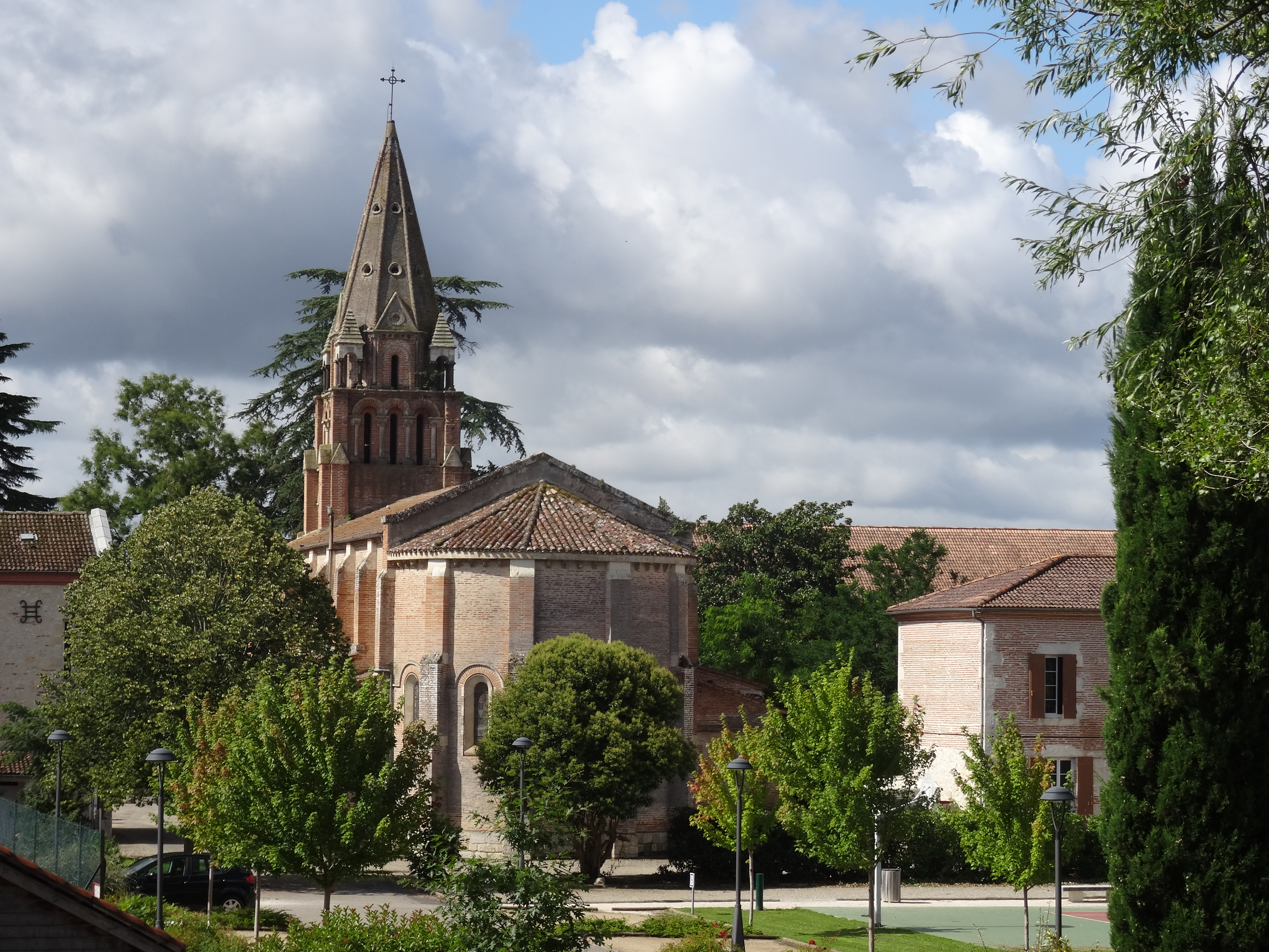 Sauveterre-Saint-Denis (47) : l'église Sainte-Catherine